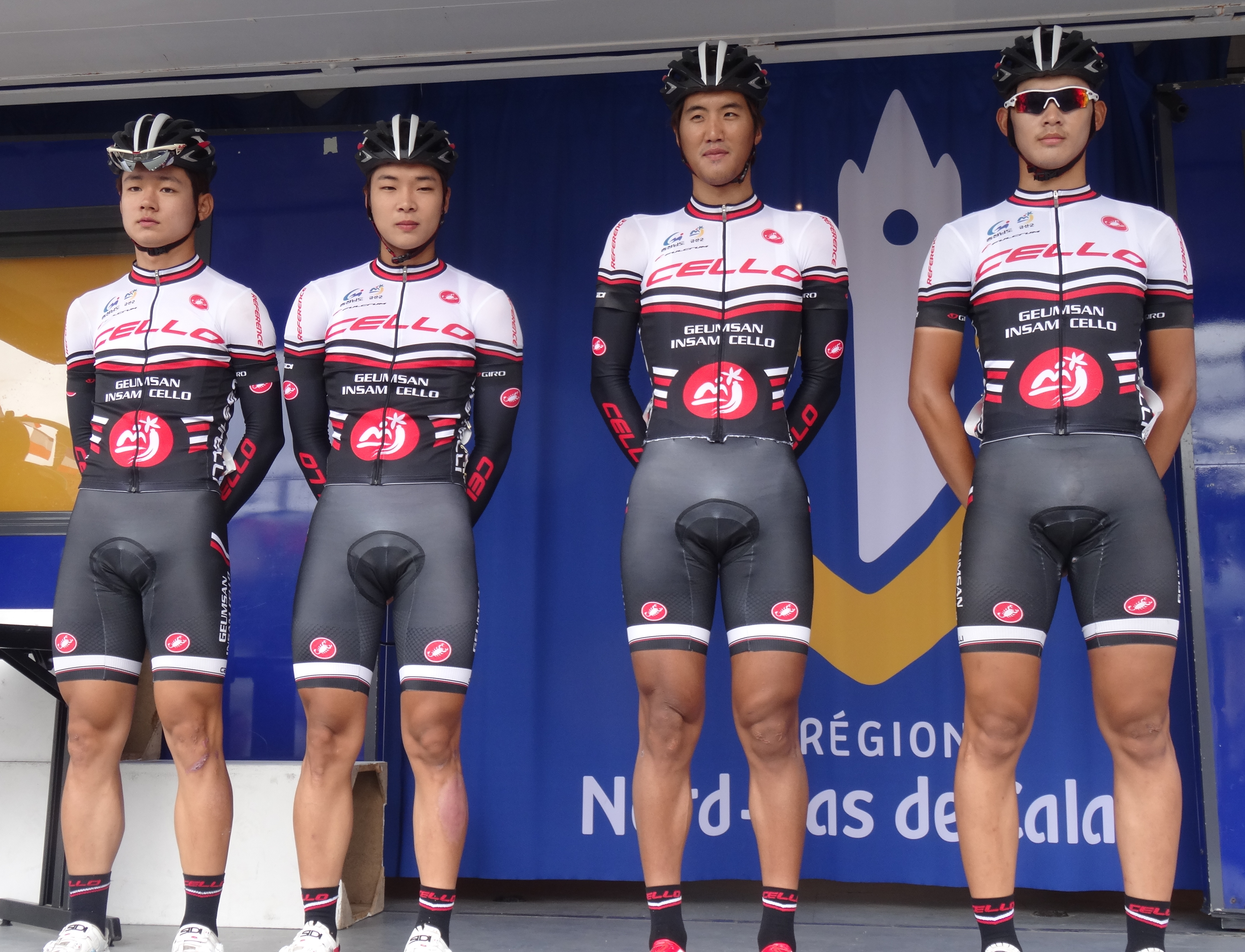 Reportage photographique réalisé le dimanche 13 juillet à l'occasion du départ et de l'arrivée de la Ronde pévéloise 2014 à Pont-à-Marcq, Nord-Pas-de-Calais, France.